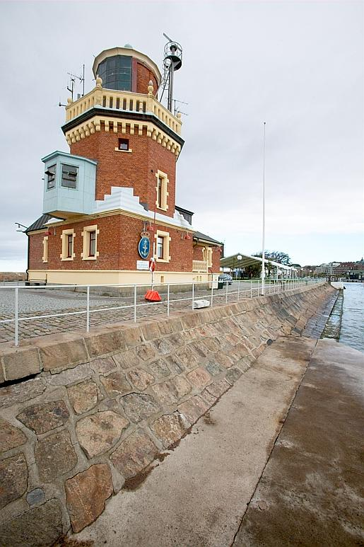 Lotshuset. Motiv: Helsingborgs hamn Nyckelord: Riksintressen Kategori: HamnmiljöerLotshuset.